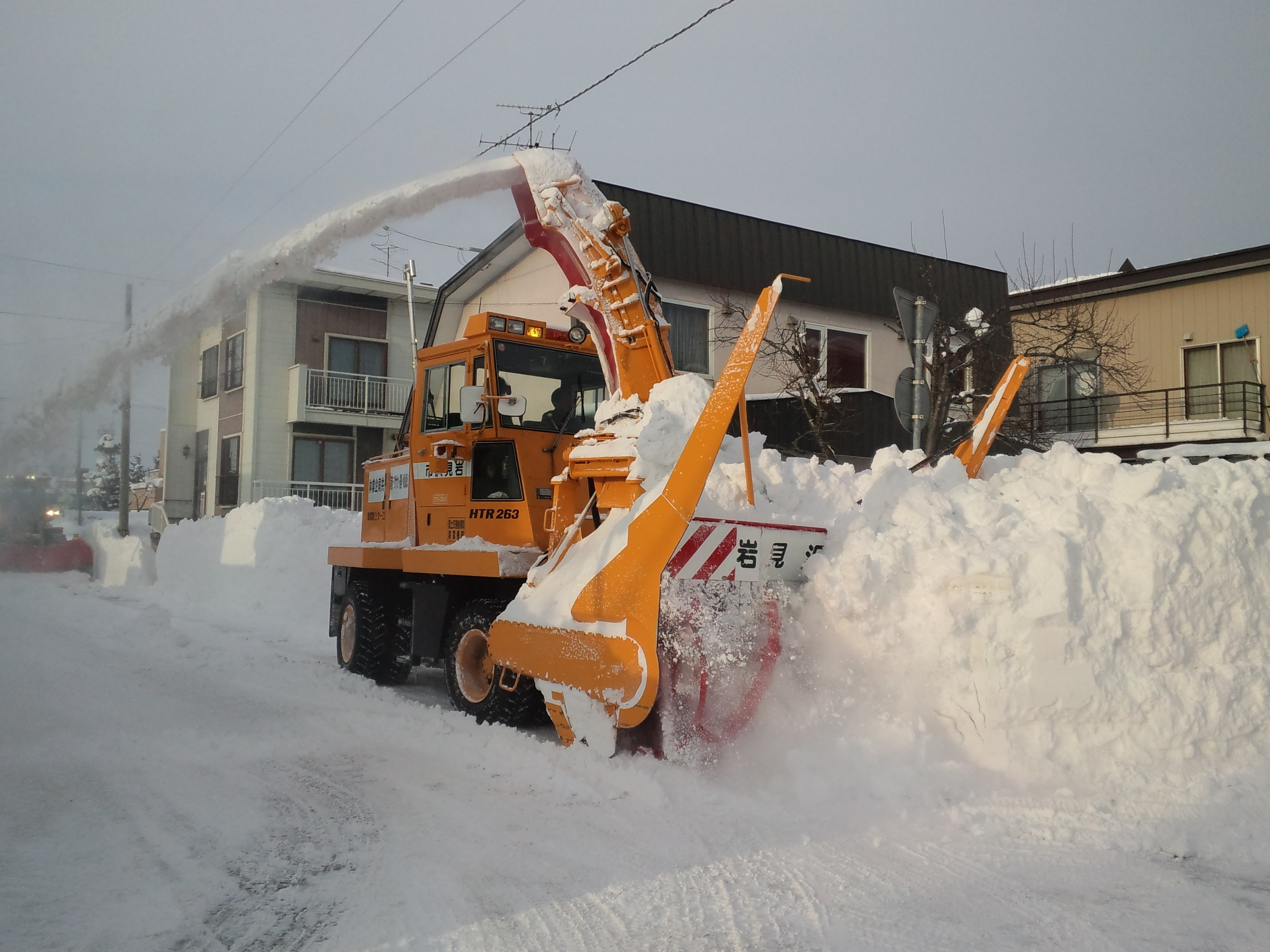 北海道岩見沢市の除雪風景